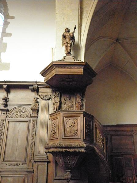 Chaire et transept nord de l'abbatiale Notre-Dame de Paimpont (35).